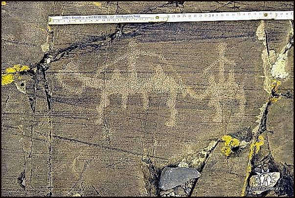 Позднескифские петроглифы на экзарированной поверхности "курчавых скал" Чаганского скэбленда, Юго-Восточный Алтай. Фото А.Е. Рудого